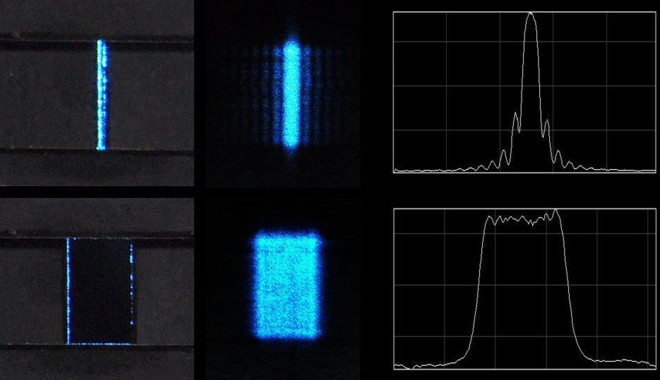 Slit and intensity distribution behind slit (ca 48cm distance) as image and graph (vertically summed intensity/pixel values) for a narrow slit (diffraction pattern) and wide slit. Illumination with a DPSS laser @ 491nm